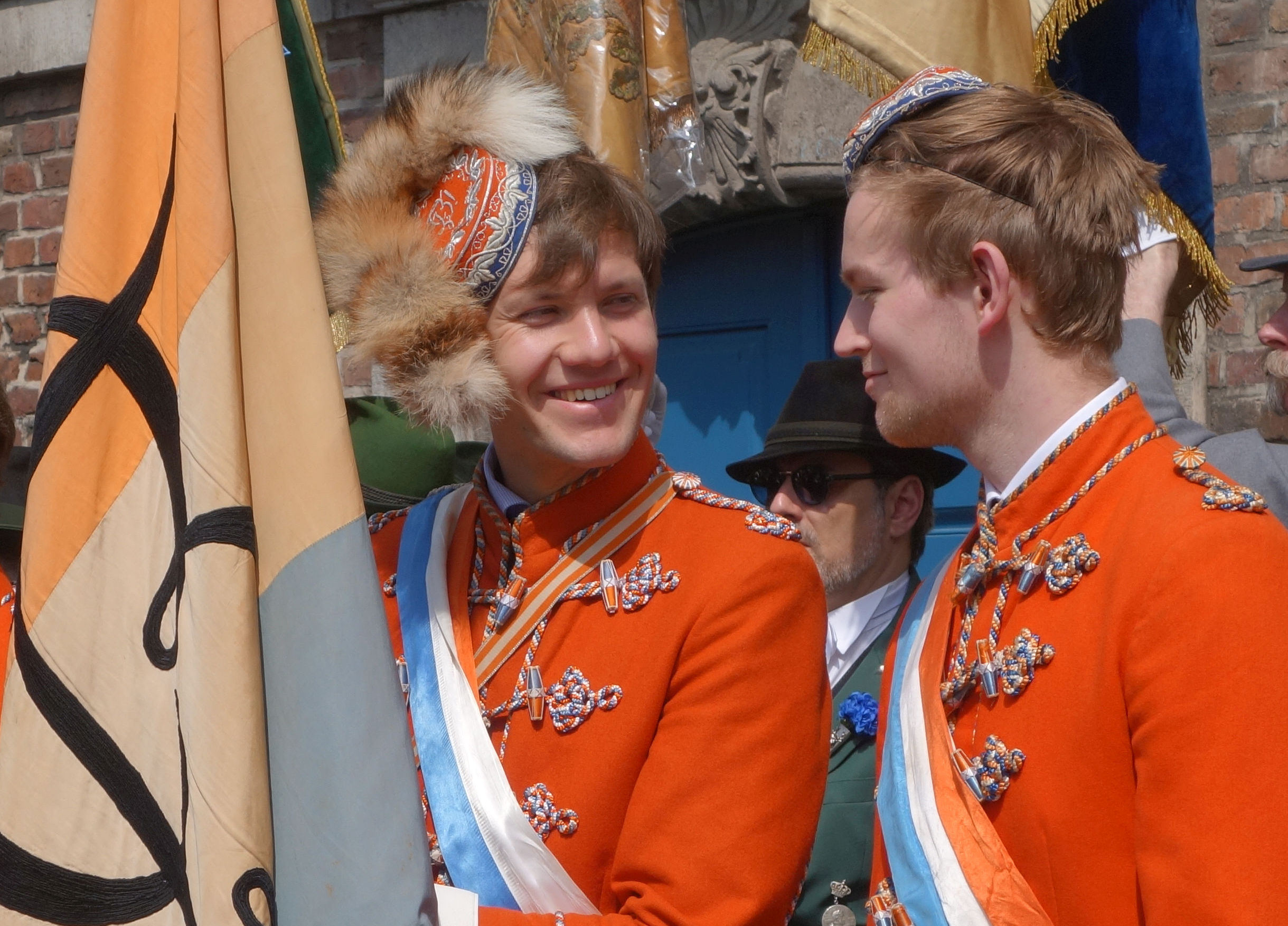 Fronleichnamsprozession Düsseldorf 26. Mai 2016. Katholisch deutsche Studentenverbindung Burgundia, in der Mitte der Fuchsmajor mit Rotfuchsschweif.